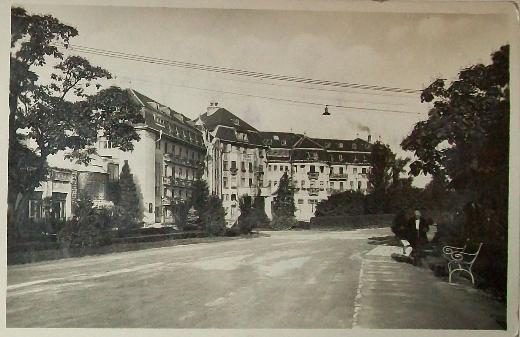 Pohľadnica hotela Thermia Palace z roku 1940 - Piešťany